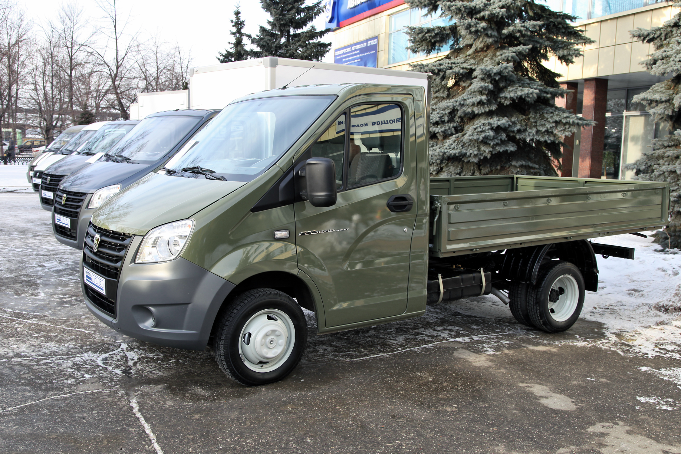 Бортовой автомобиль ГАЗ-А21R32 ГАЗель NEXT (GAZ-A21R32 GAZel NEXT)